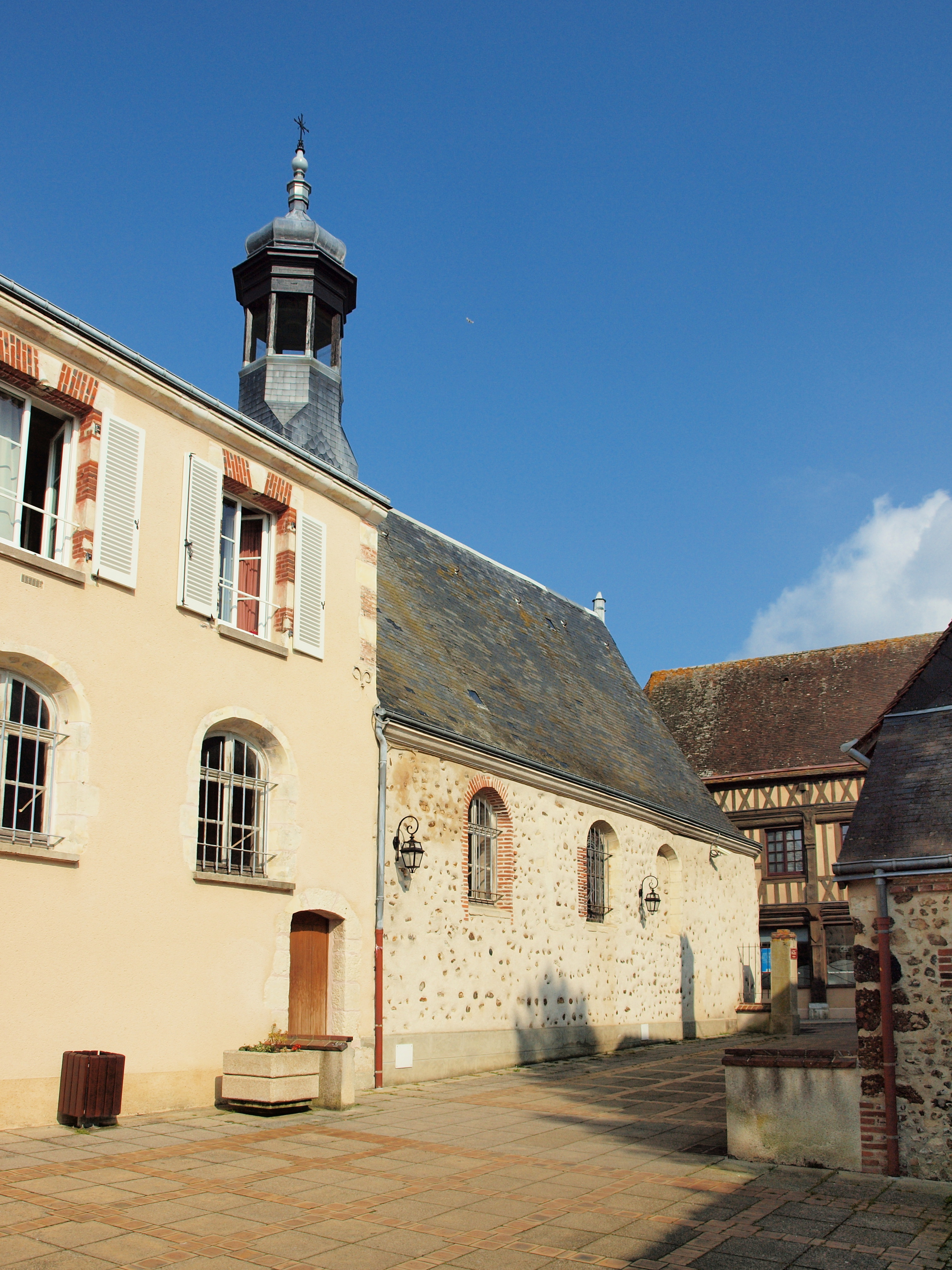 Brou (Eure-et-Loir, France)